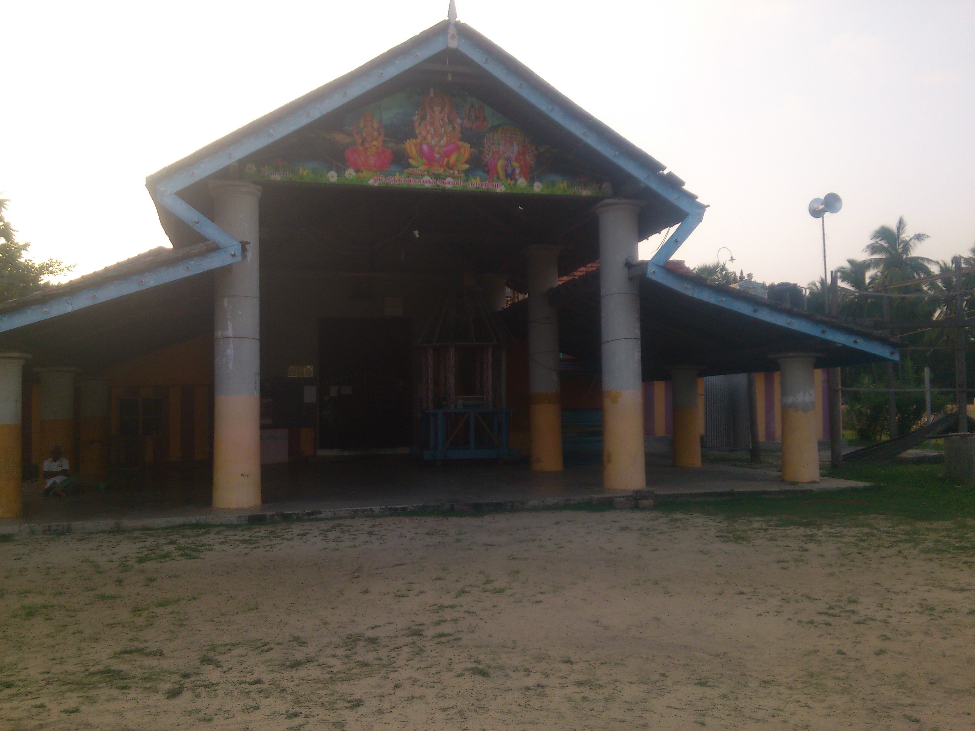 சித்தி விநாயகர் ஆலயம்